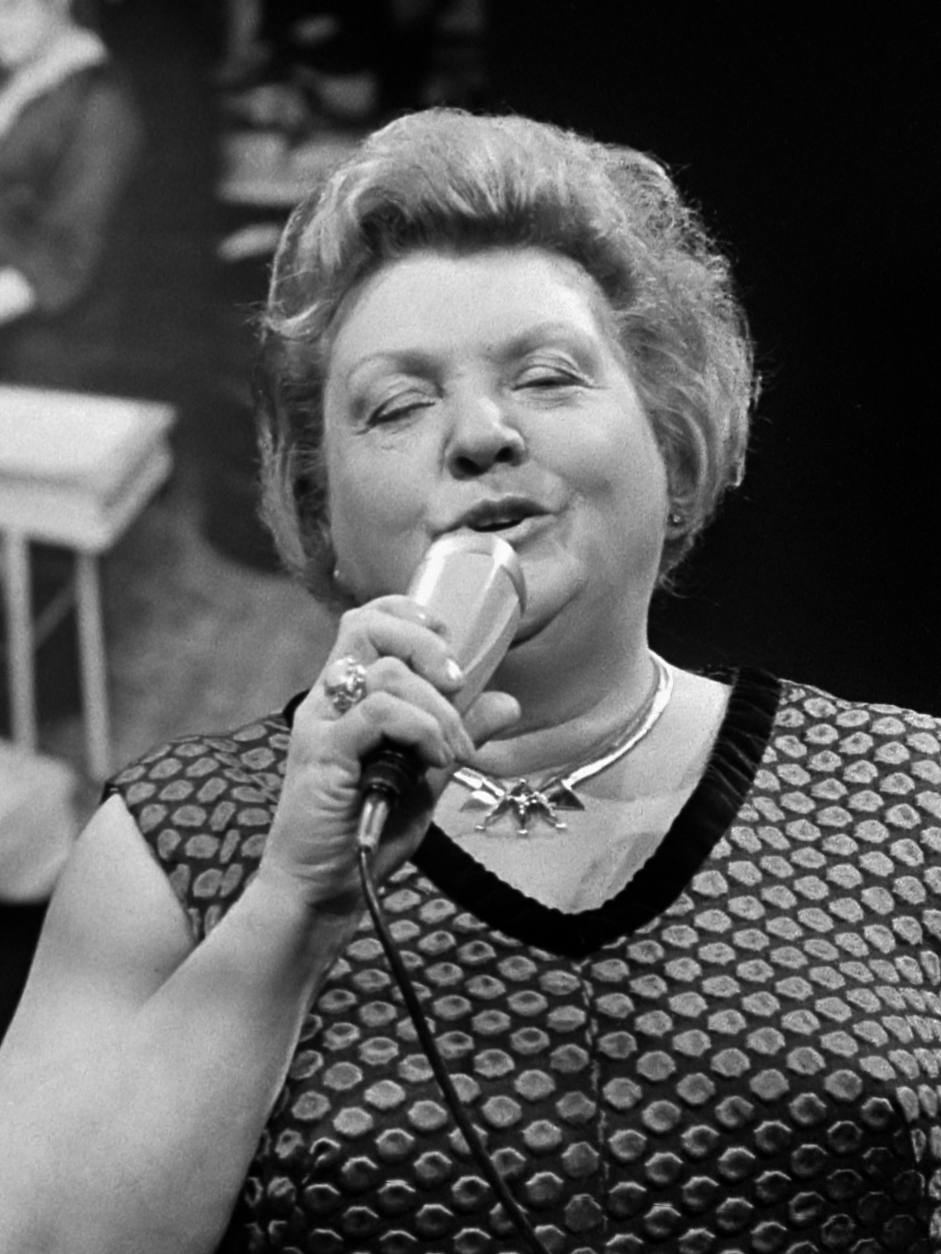 TV-opnamen "Op losse groeven" van TROS, Tante Leen zingt 7 december 1971